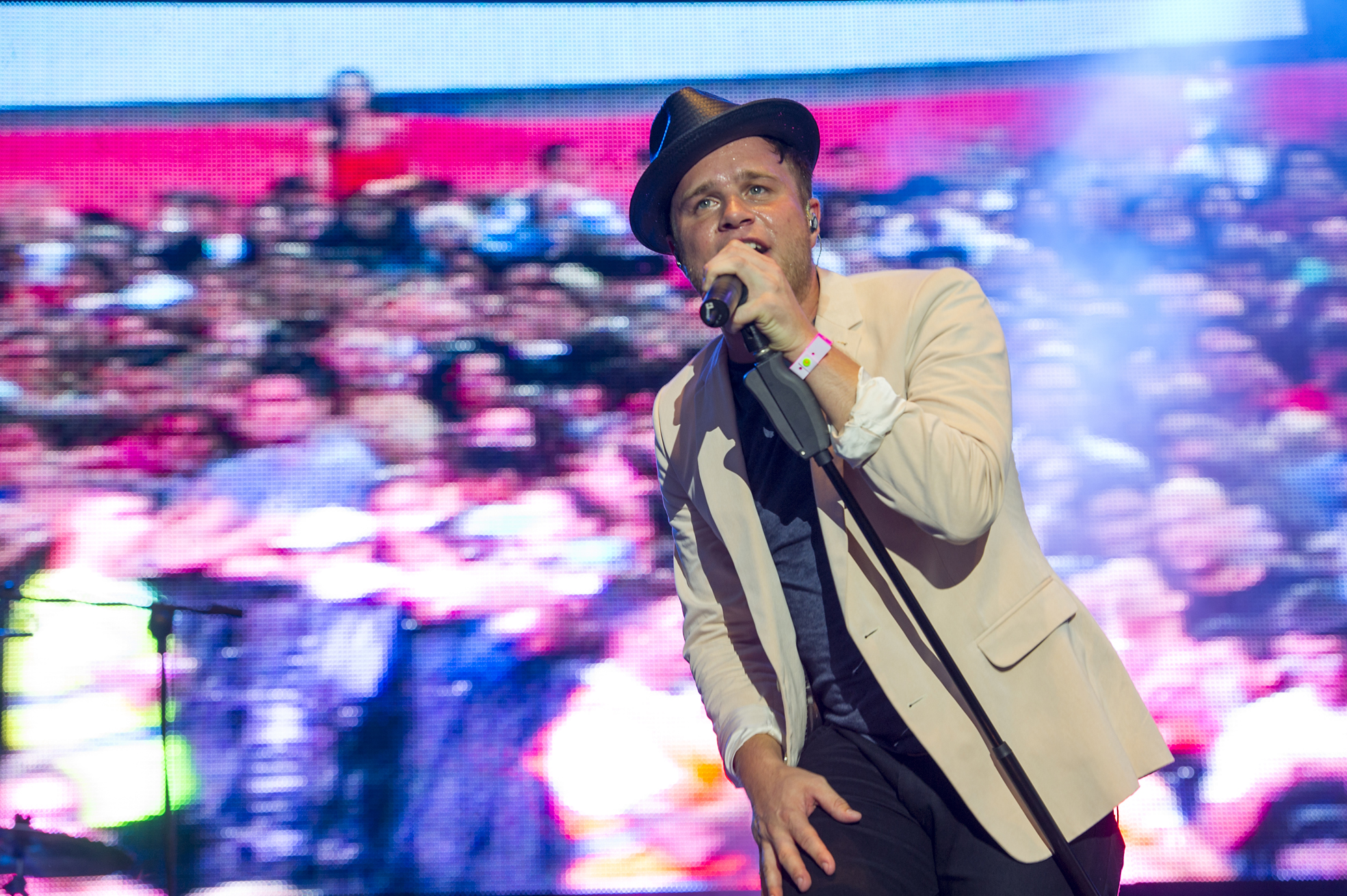 GIBRALTAR MUSIC FESTIVAL 2013 - OLLY MURS